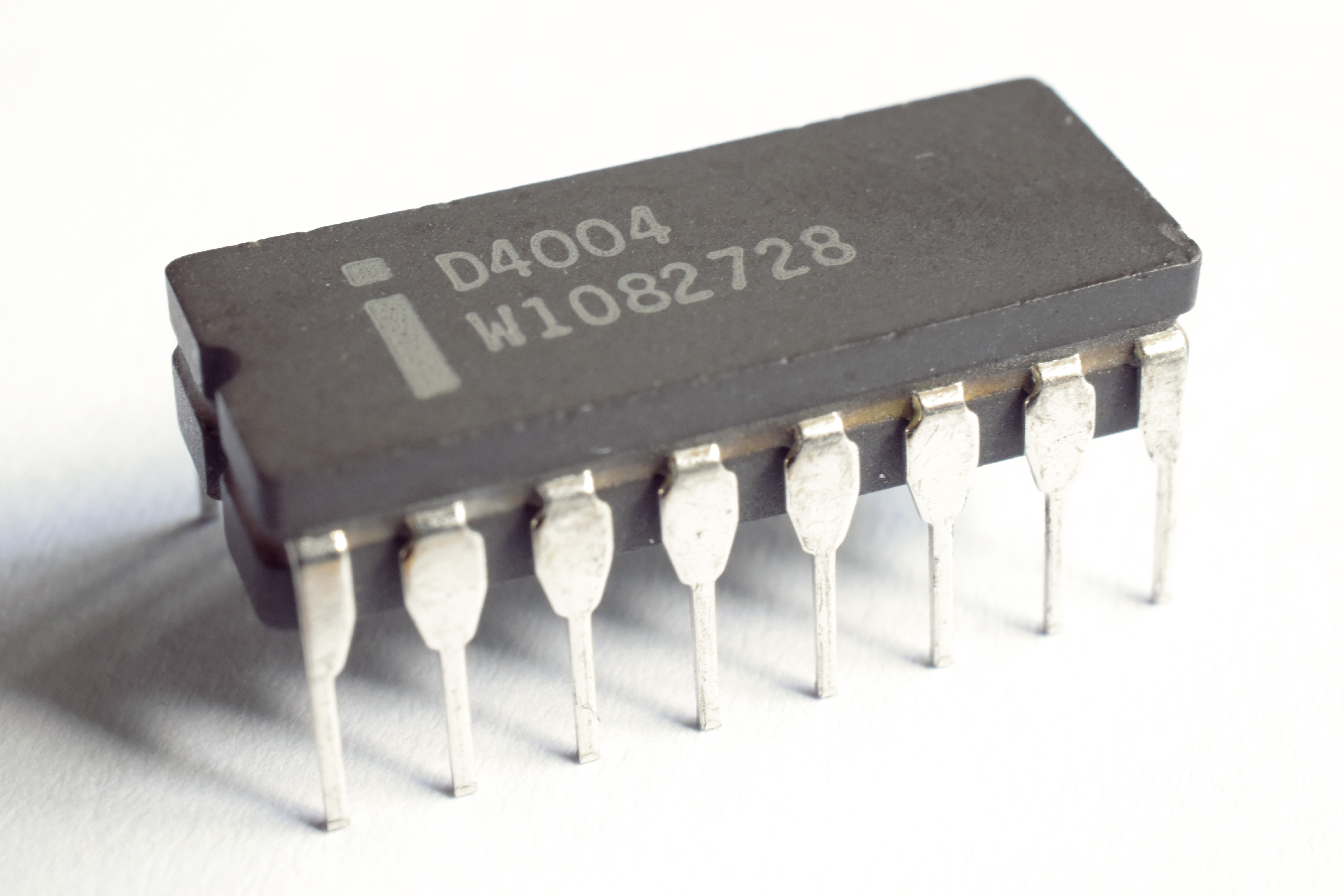 Procesoro Intel D4004.